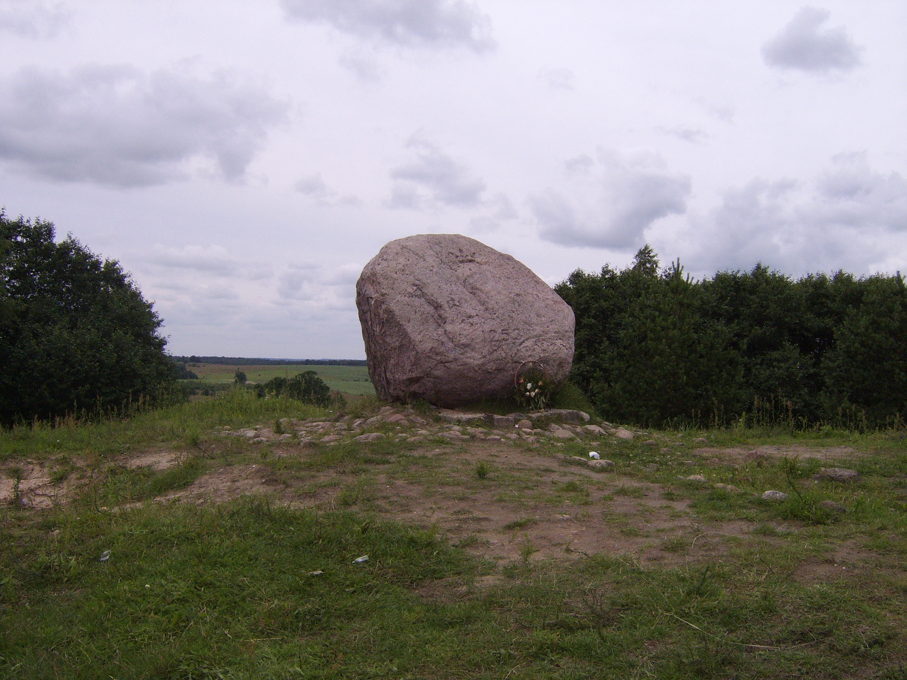 Komentaras Foto: Tomaš Staševskij